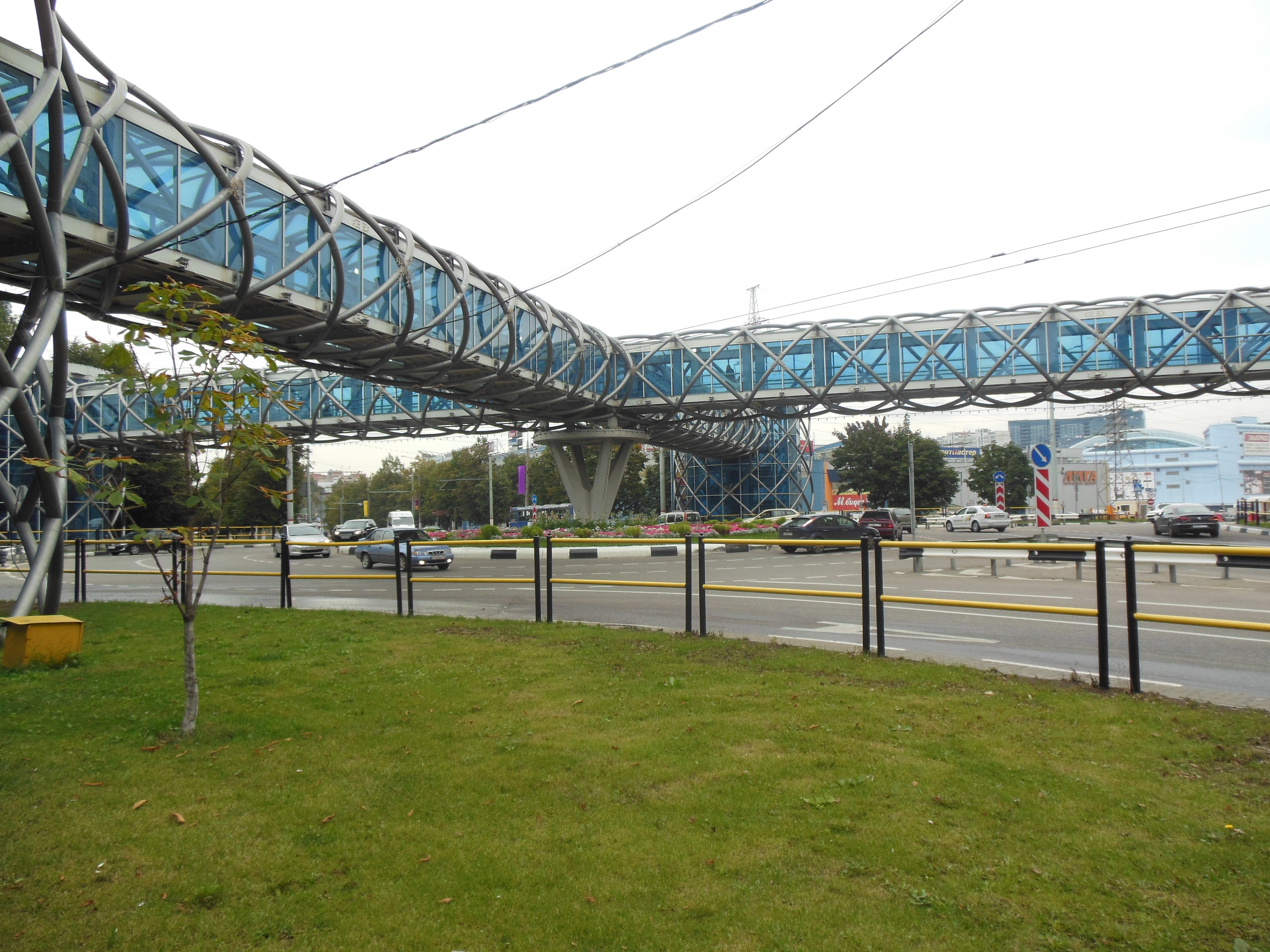 Надземный пешеходный переход.